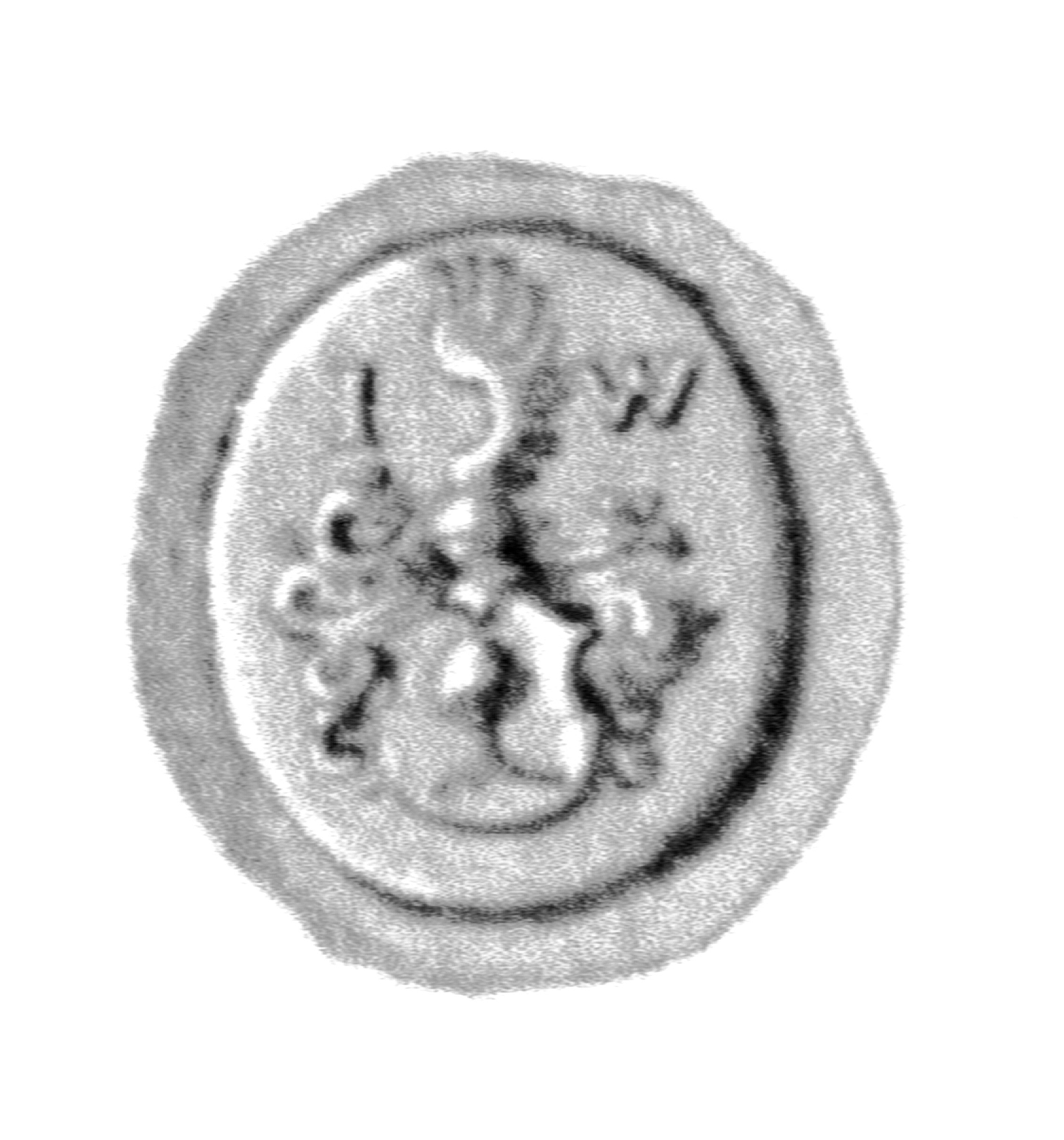 Siegel des Ratsmannes Hieronymus Warmböke. Das Siegel stammt aus der Zeit um 1550. Siehe Emil Ferdinand Fehling: Lübeckische Ratslinie, Nr. 654 (Hieronymus Warmböke).